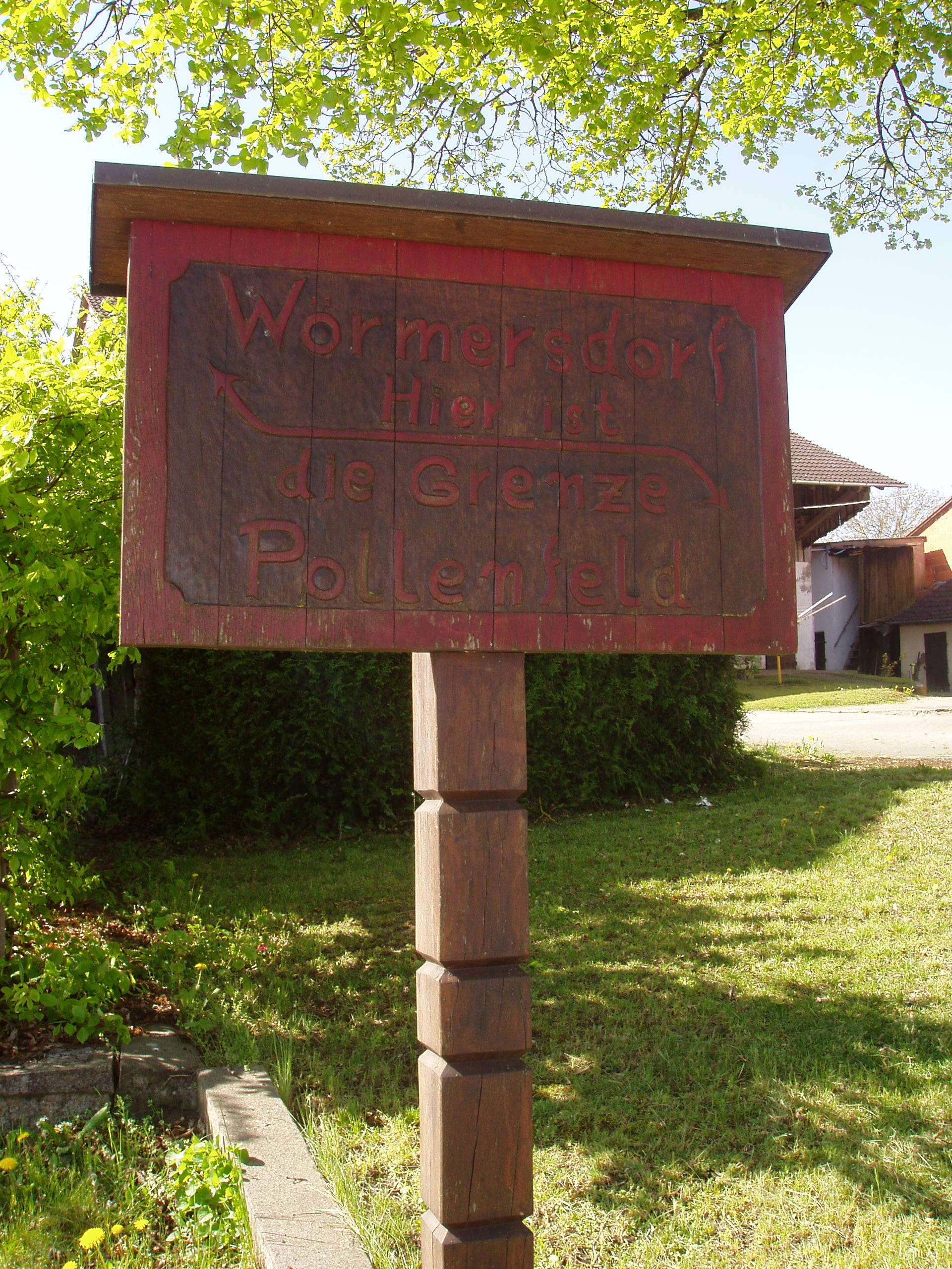 Grenzzschild Wörmersdorf-Pollenfeld